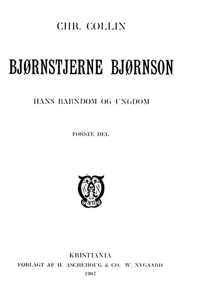 Tittelsiden til Bjørnstjerne Bjørnson av Christen Collin.